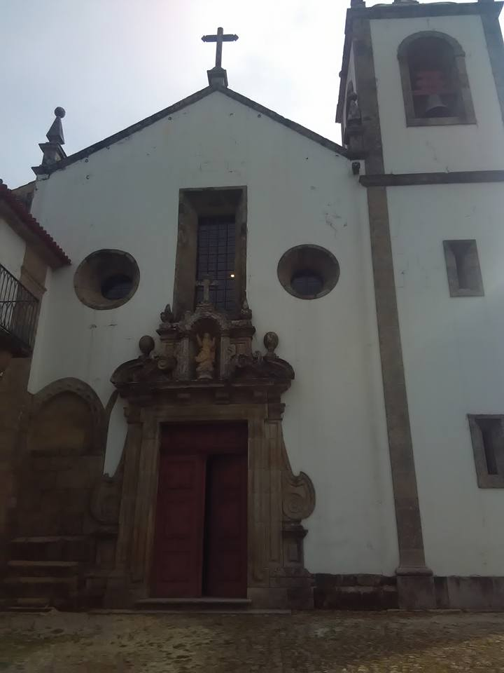 Fachada principal onde são visíveis diversas características românicas